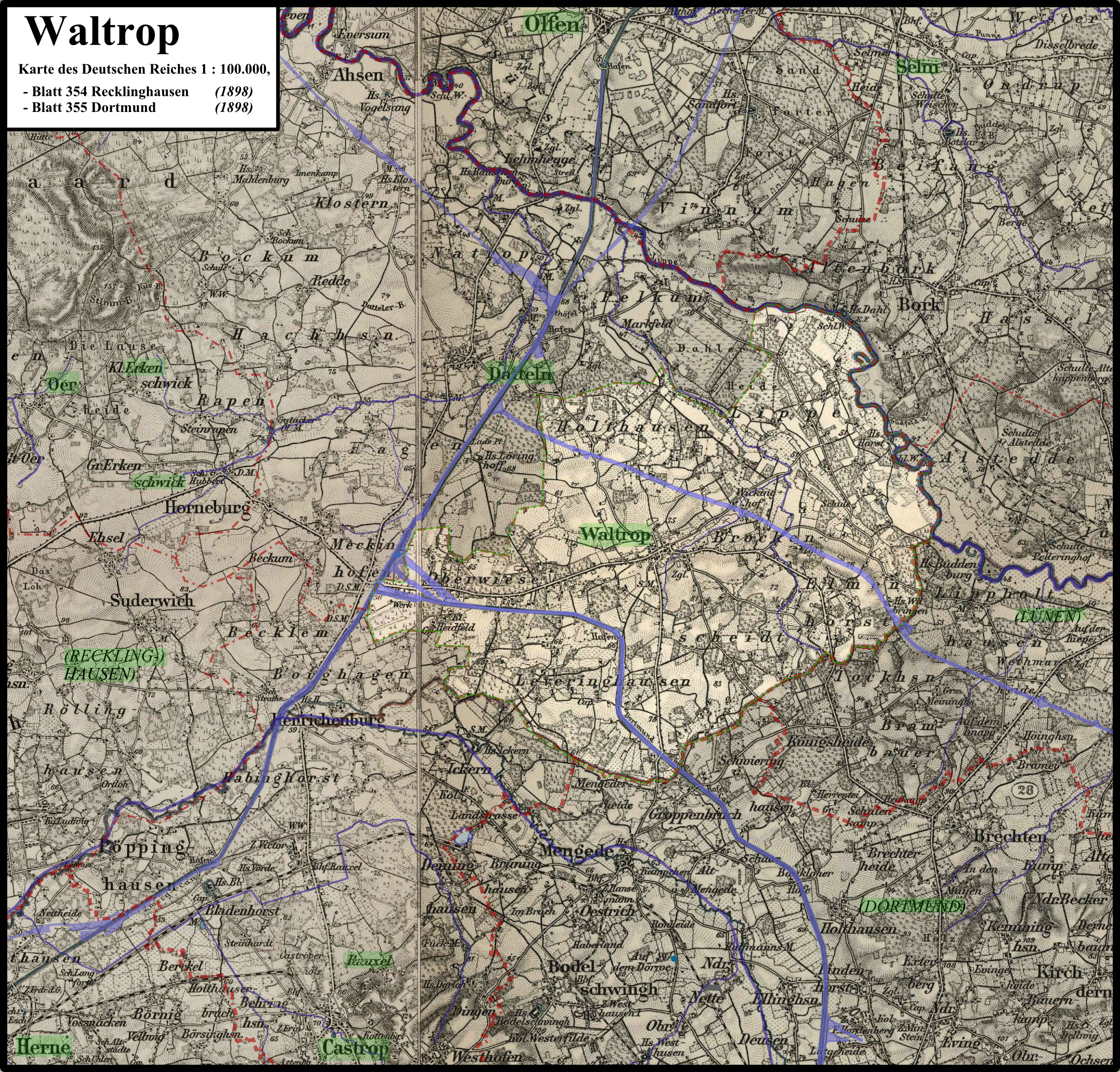 Karte der Stadt Waltrop auf Basis der Karte des Deutschen Reiches 1 : 100.000, Ende des 19. Jahrhunderts;Verwaltungsgrenzen (rot), Kanäle, Flüsse und Seen entsprechen dem heutigen Stand/Verlauf; heutige Stadtnamen sind hellgrün hervorgehoben (damalige Stadtnamen in Großbuchstaben), aufgehellt und hellgrün umgrenzt ist die heutige Stadt Waltrop.